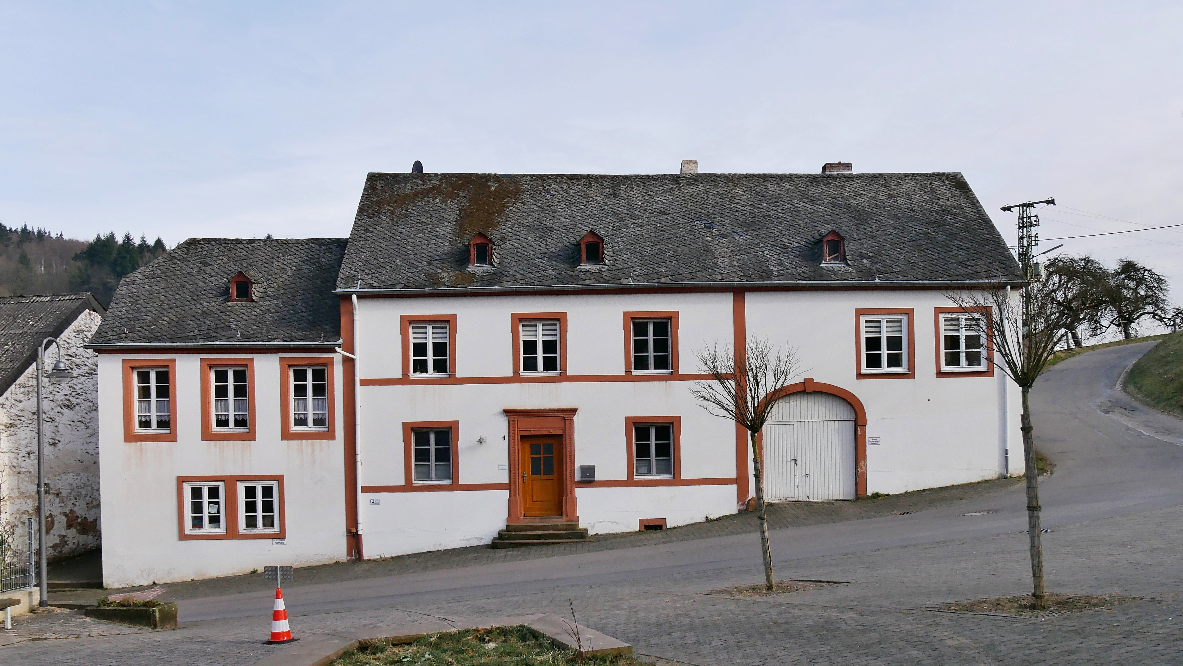 Aach bei Trierː Pfarrhaus neben der Kirche St. Hubertus